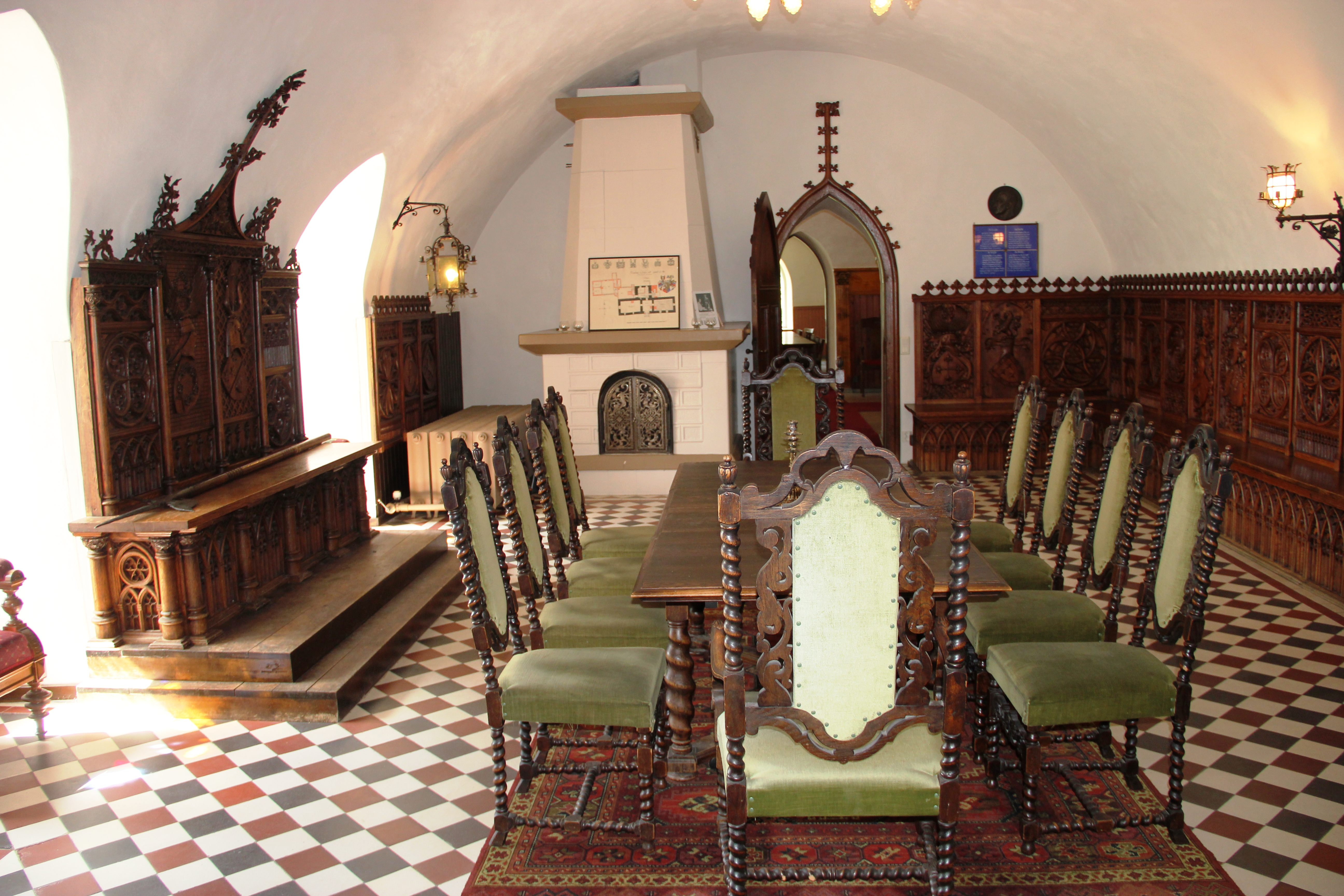 Suitian kartano, alakerran sali pääovelta oikealla